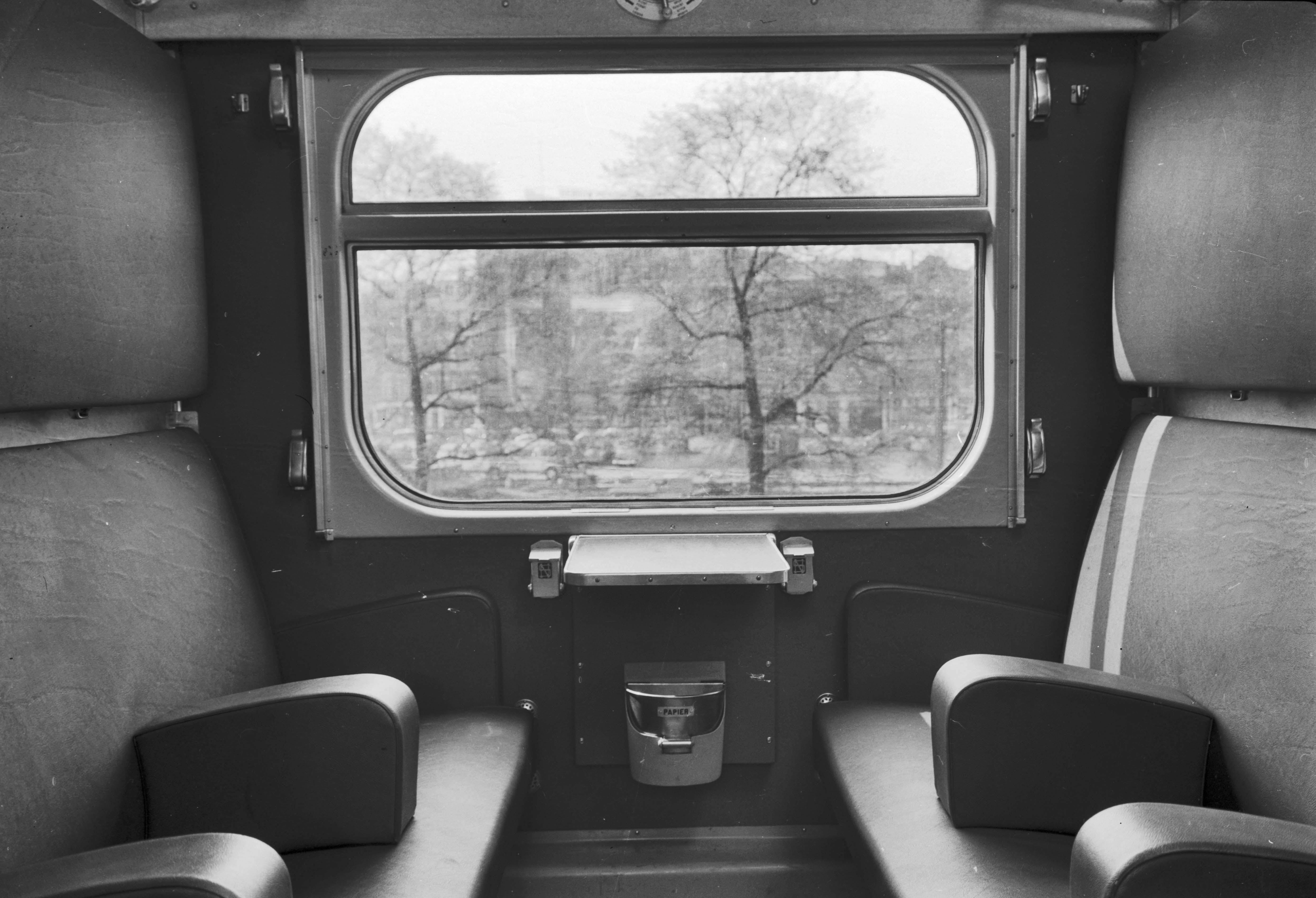 Interieur van een ligrijtuig uit de serie NS B 7001-7025 (plan N) van de N.S.